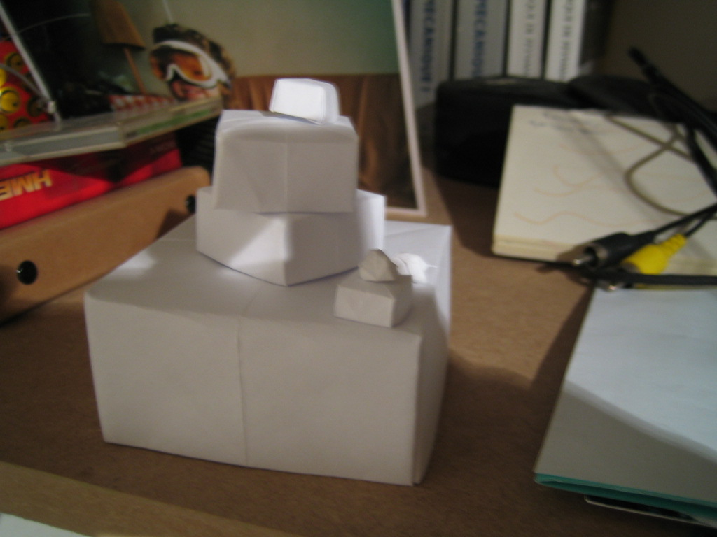 origami boxes